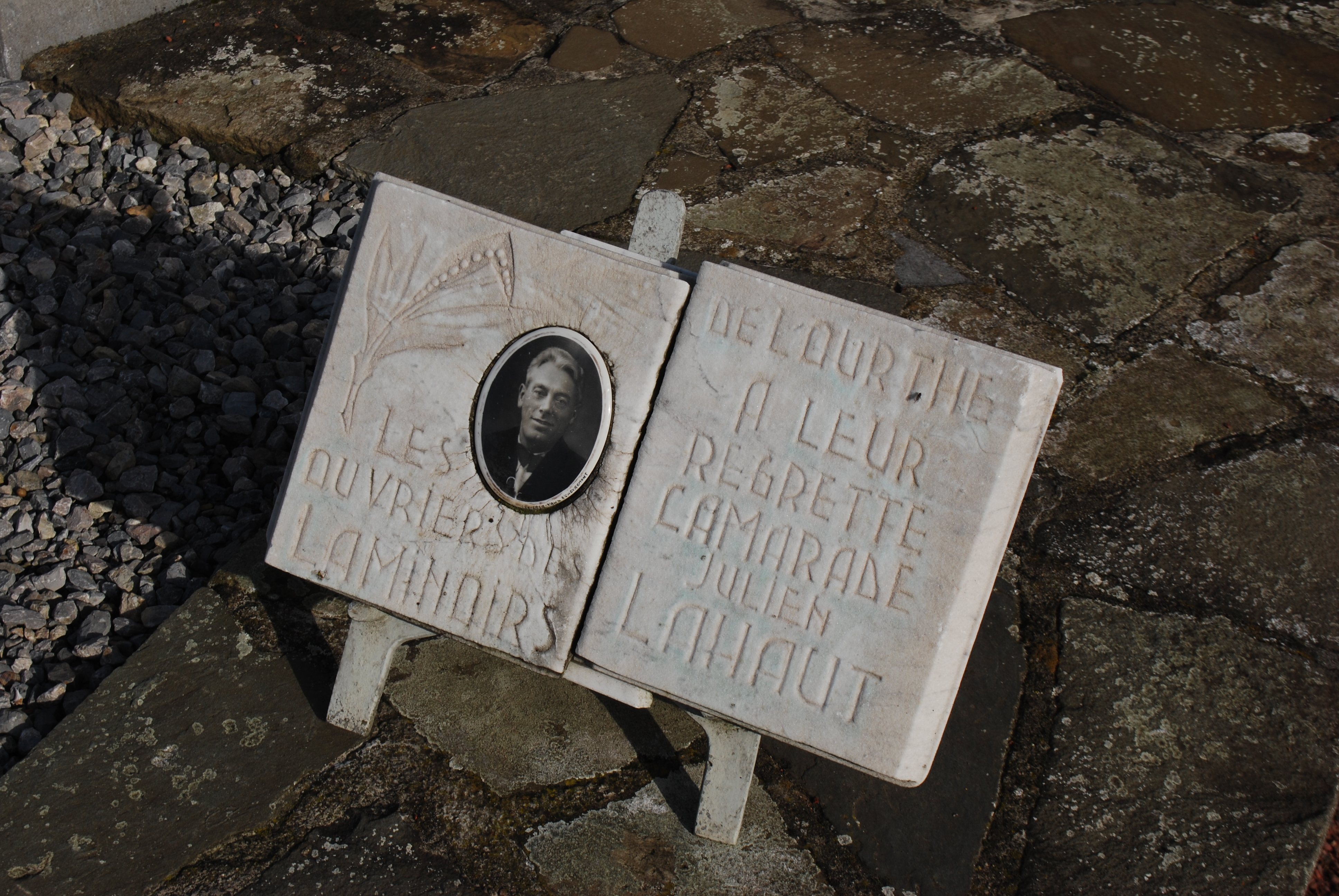 Vue du quartier des Biens Communaux, à Seraing (Belgique).